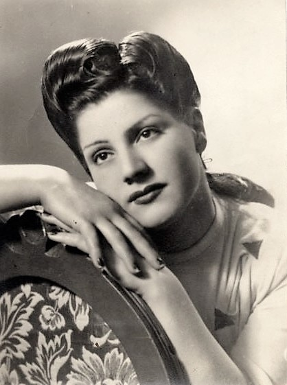 Luisa Conte